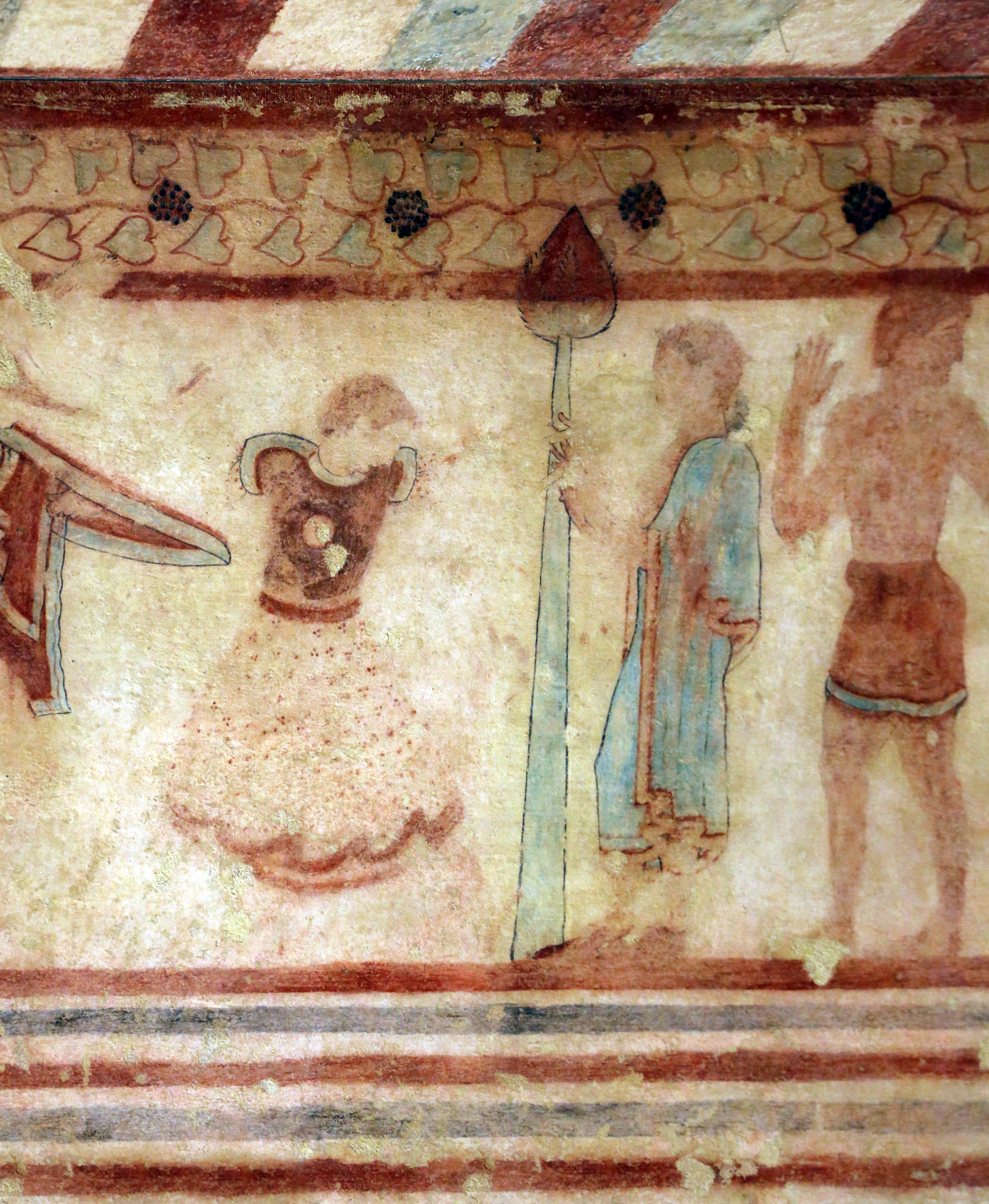 Villa Giulia (Rome) This is a photo of a monument which is part of cultural heritage of Italy.